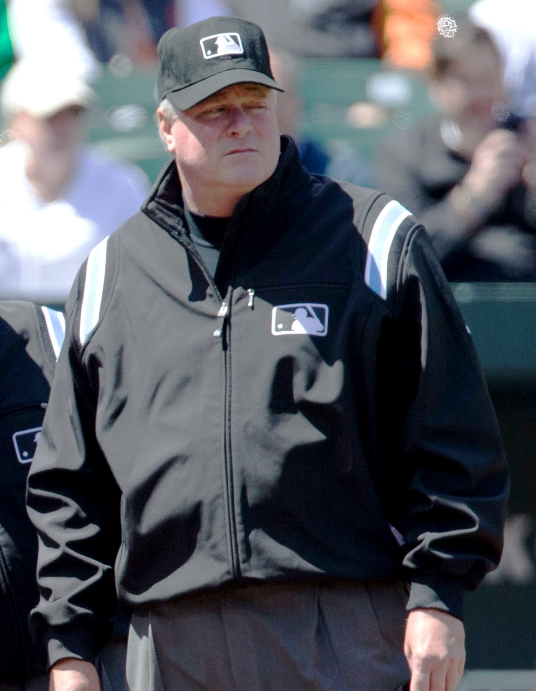 MLB umpire Tim Welke – Los Angeles Dodgers at Baltimore Orioles April 20, 2013